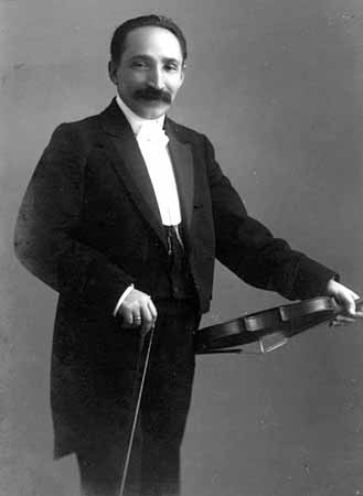 Крейн, Давид Сергеевич